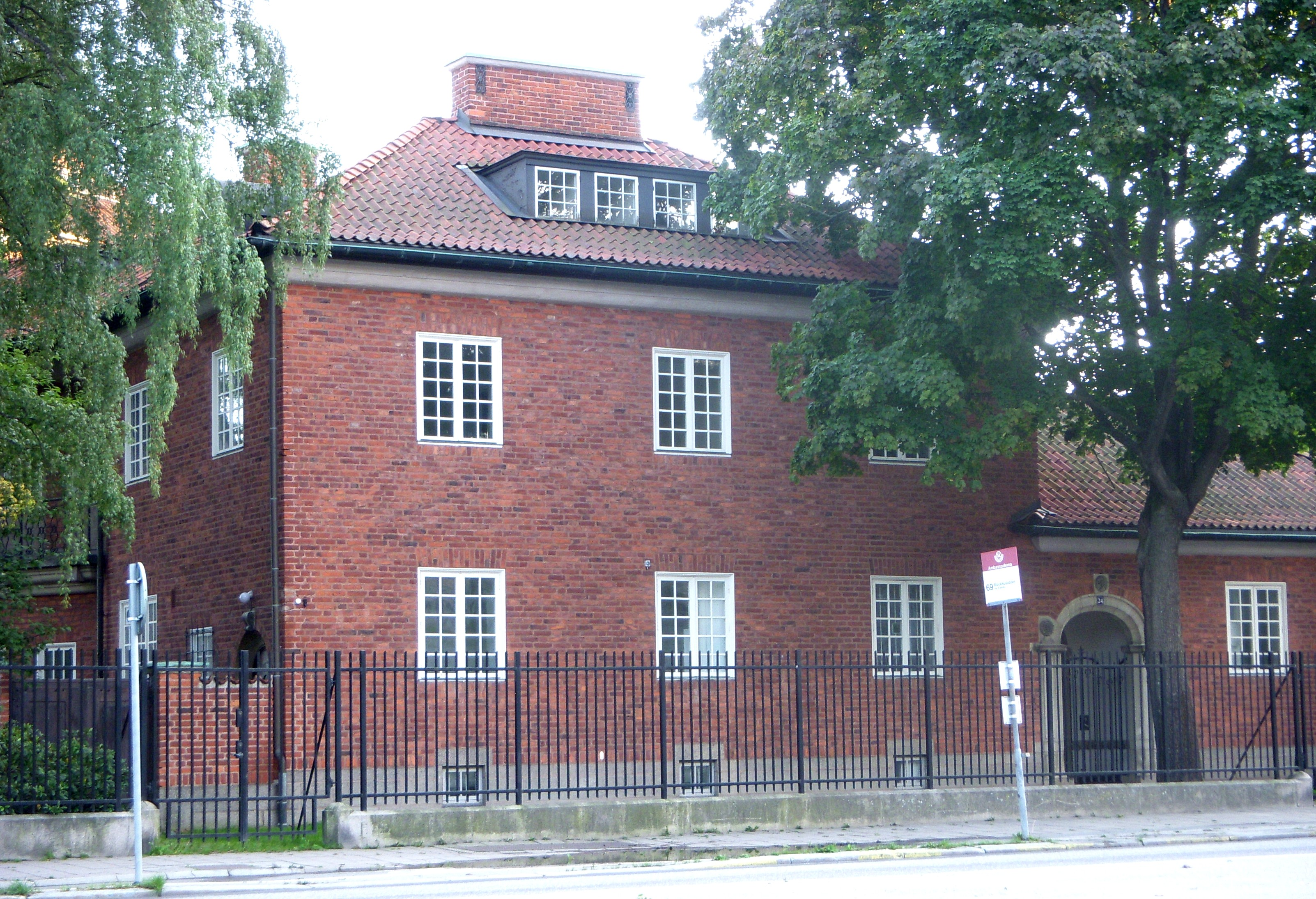 Diplomatstaden i Stockholm, "Bünsowska villan", kv. Ambassaden nr. 5, fasad mot Dag Hammarskjölds väg